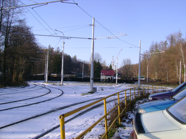 Smyčka v Kyjovicích-Budišovicích